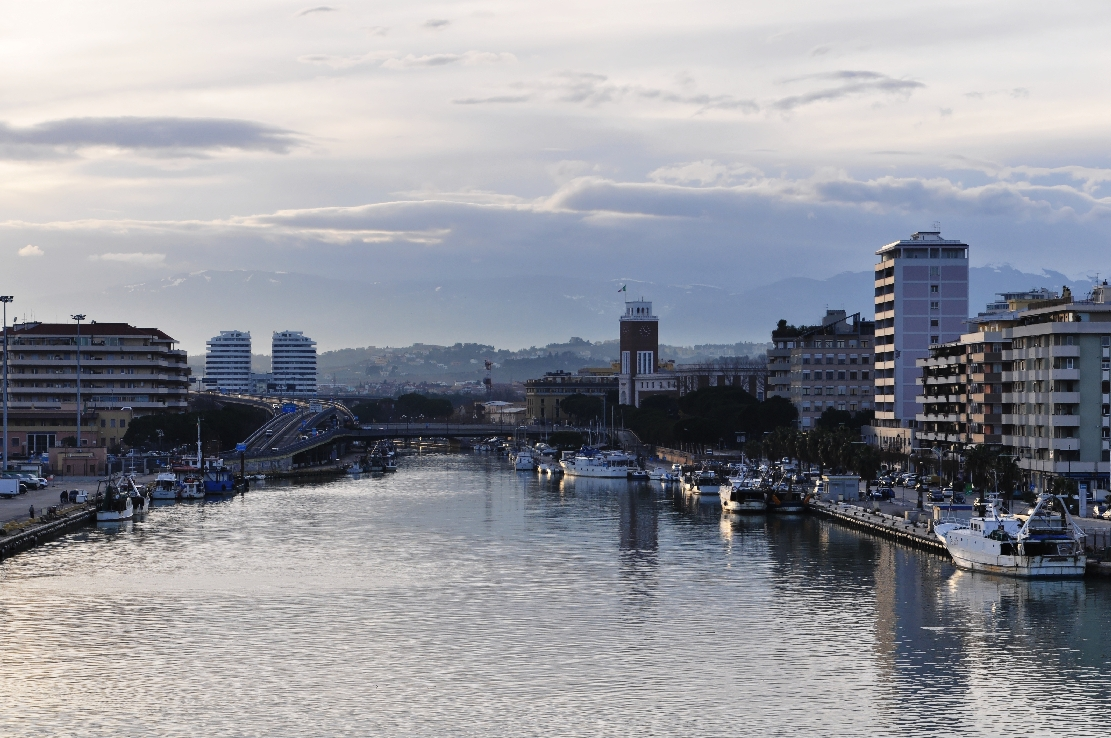 Ponte del mare Pescara Winter 2013